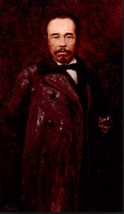 Depicted person: Kawakami Tōgai